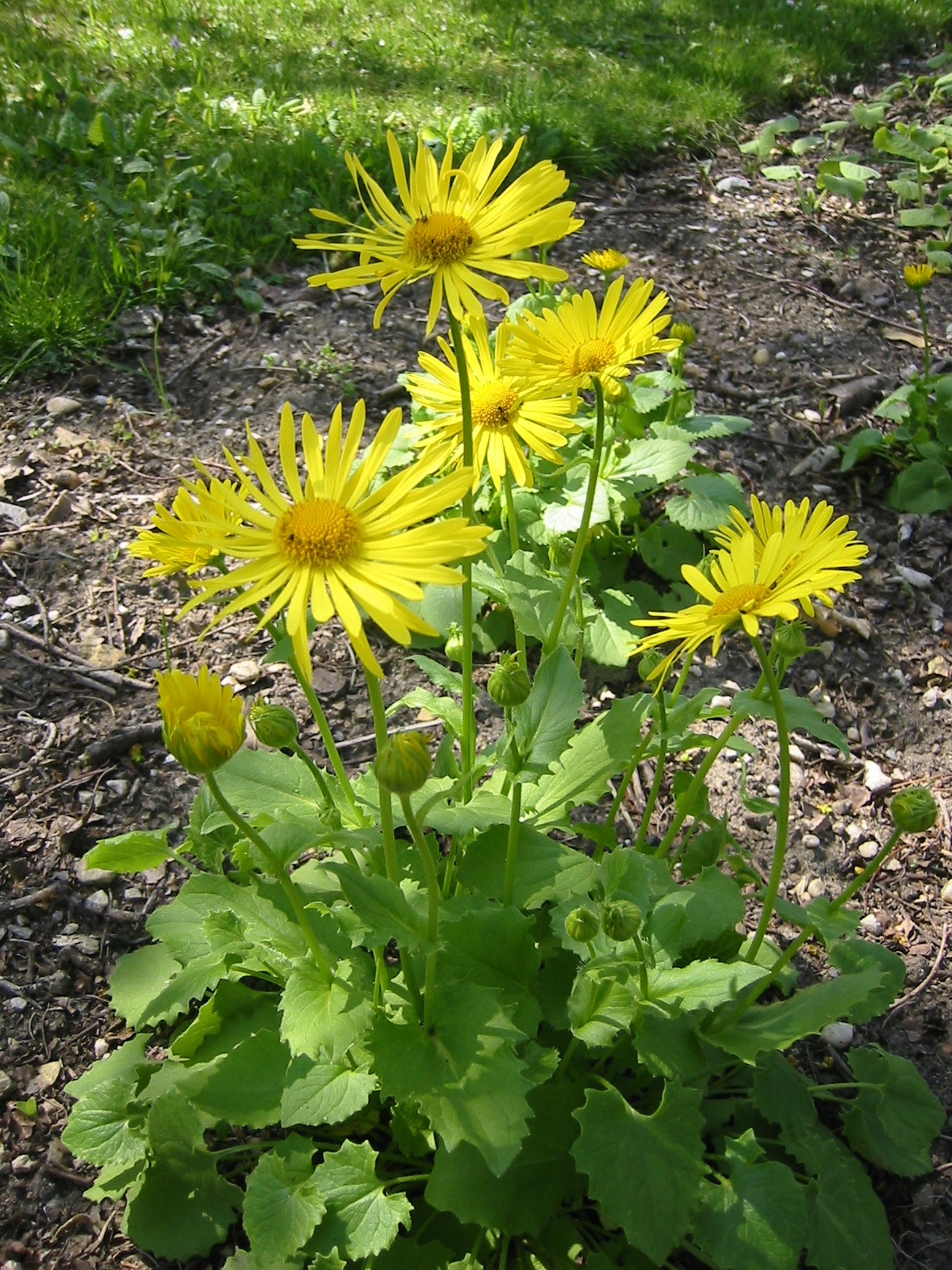 Doronicum columnae; Botanic Garden, Vienna, Austria.